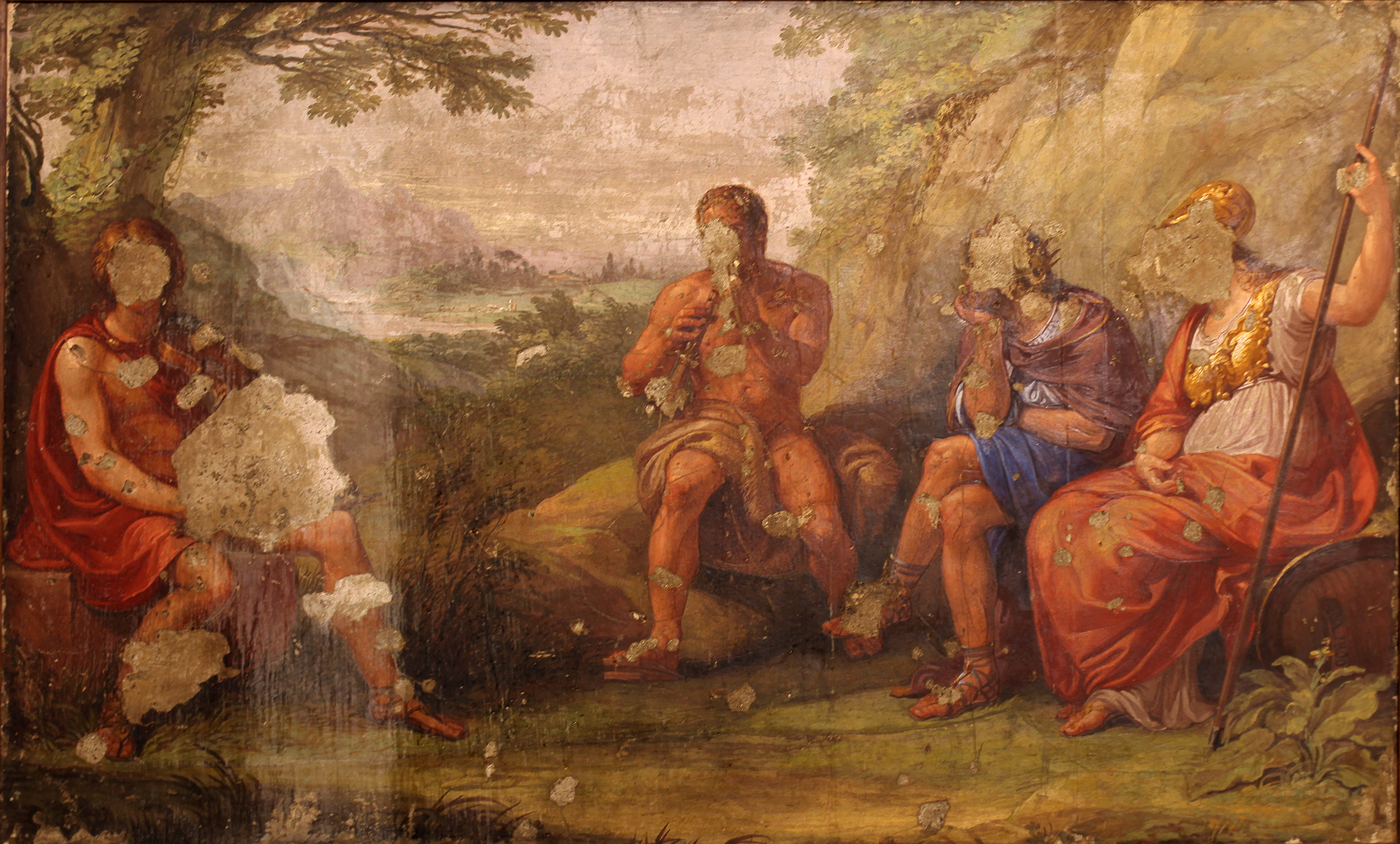 Andrea Appiani (1754-1817) Apollo e Clizia (1800) Palazzo Morando, Milano; l'affresco era parte delle decorazioni di Palazzo Sannazzaro, dimora del ministro Giuseppe Prina, distrutto dai rivoltosi il 20 aprile 1814 durante la sollevazione contro i Francesi